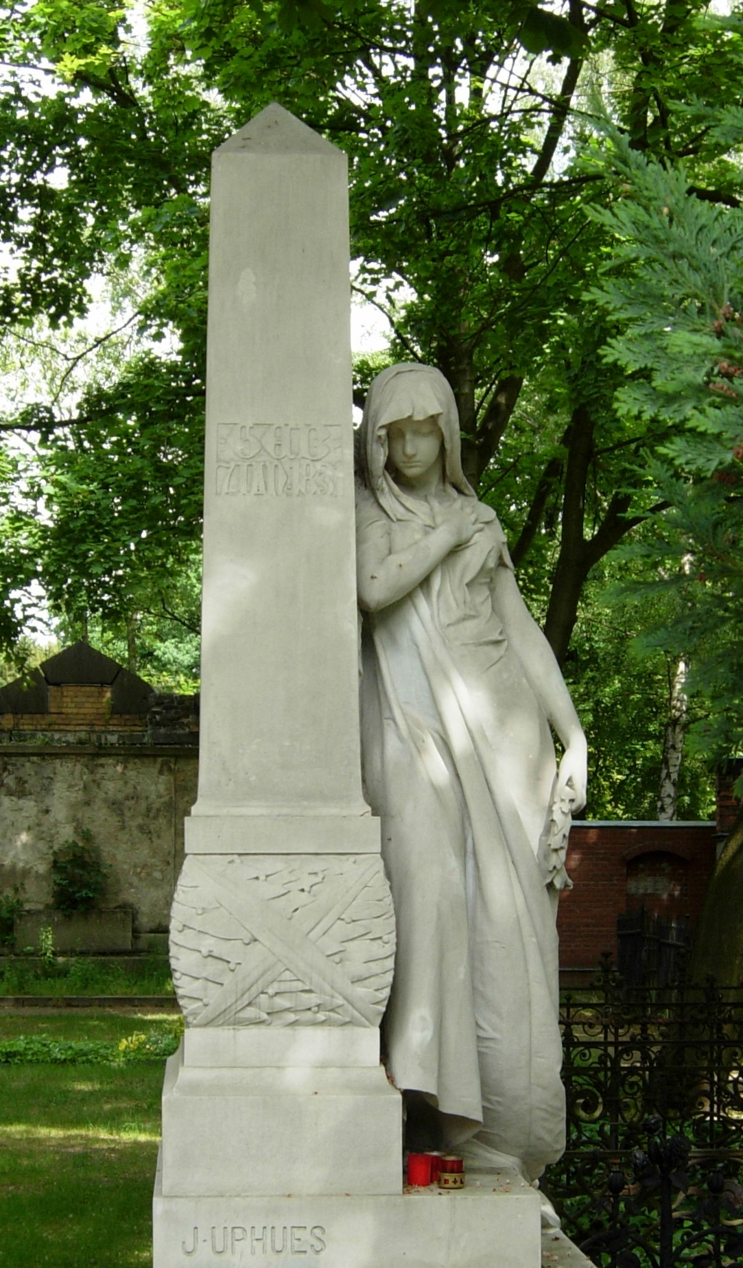 Berlin-Kreuzberg: Trauernde von Joseph Uphues (1851 - 1911) am Grab Heinrich von Stephans (1831 - 1897), des Generalpostmeisters und Organisators der deutschen Post, auf dem Friedhof I der Dreifaltigkeitsgemeinde vor dem Halleschen Tor (die Inschrift lautet: geb. 7. Jan. 1831)